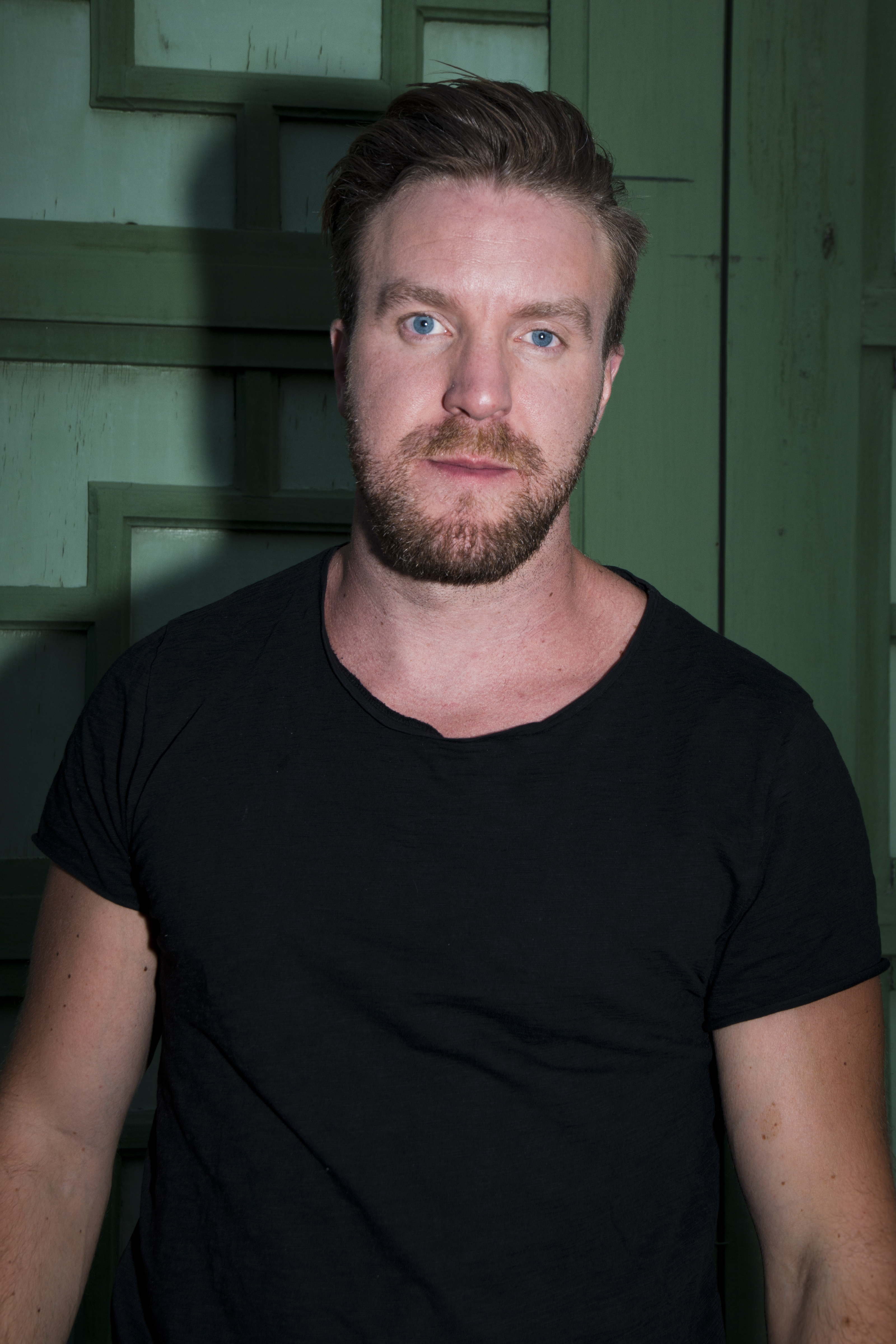 John De Sohn på Sommarkrysset, Gröna Lund i Stockholm